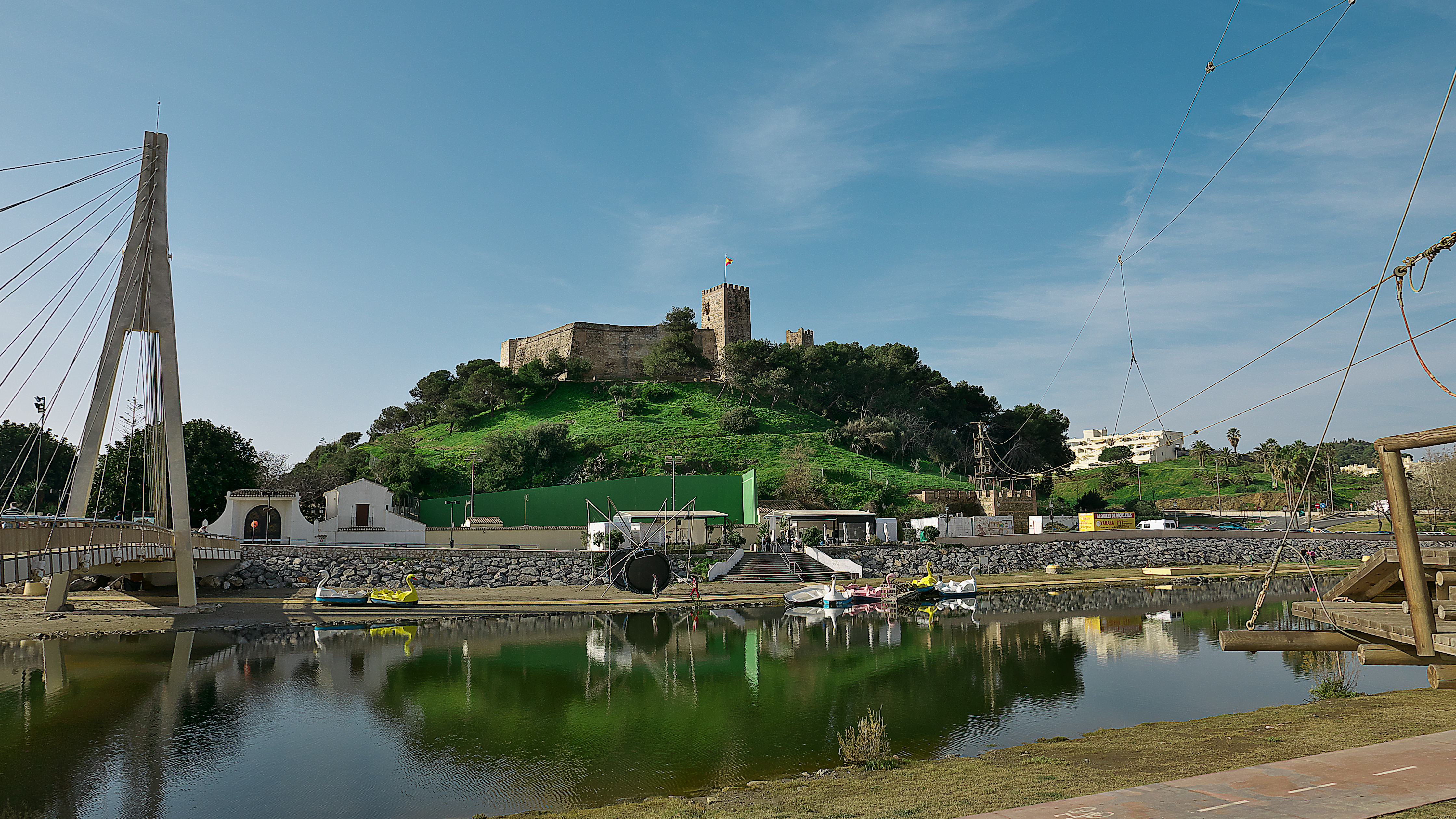 Fortaleza militar en la costa de Fuengirola.